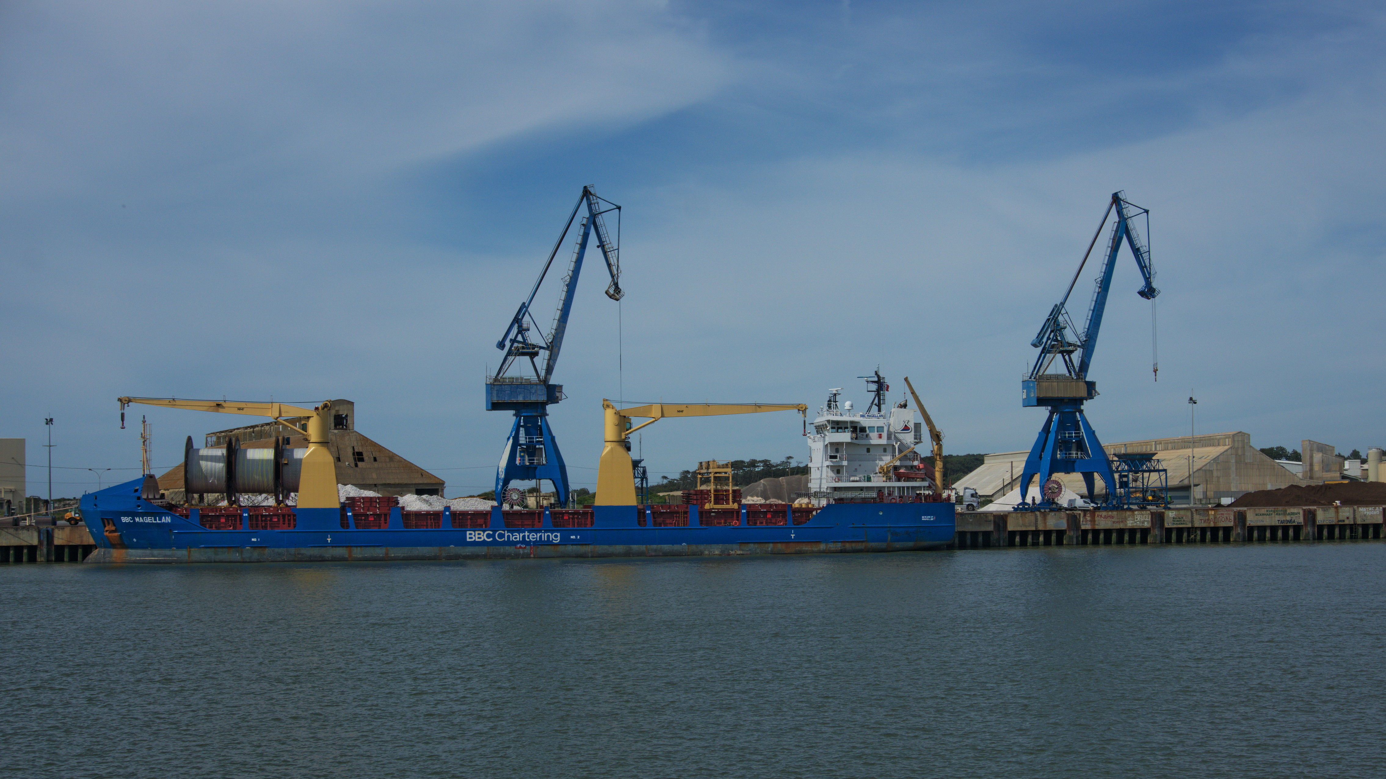 Cargo BBC-Magellan dans le port de Bayonne